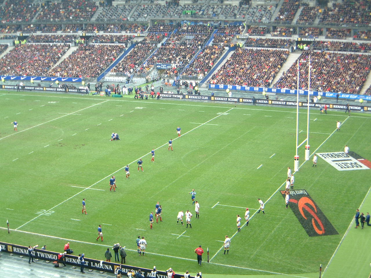 France-Angleterre Tournoi des VI Nations 02-03-2002